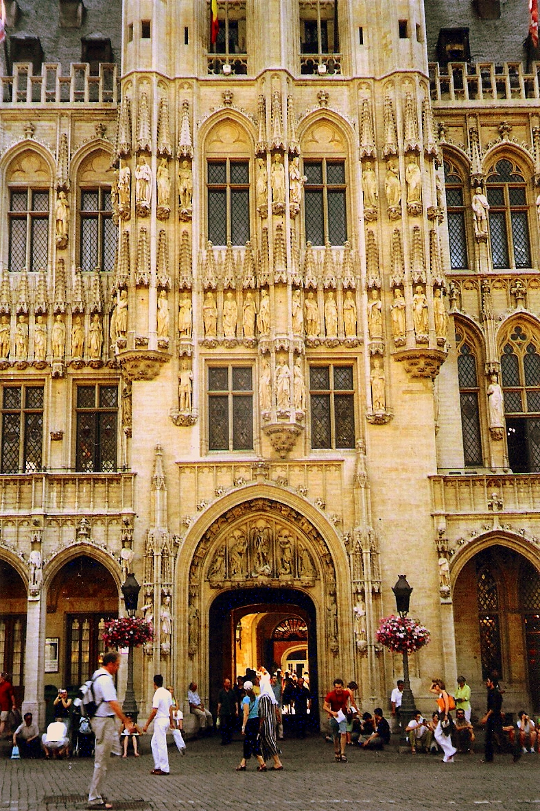 BRUXELLES - Detall de l´entrada principal de l´ajuntament